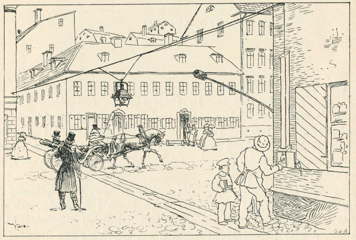 En argandsk lykta på Drottninggatan i Stockholm omkring 1828 efter en illustration av Vicke Andrén